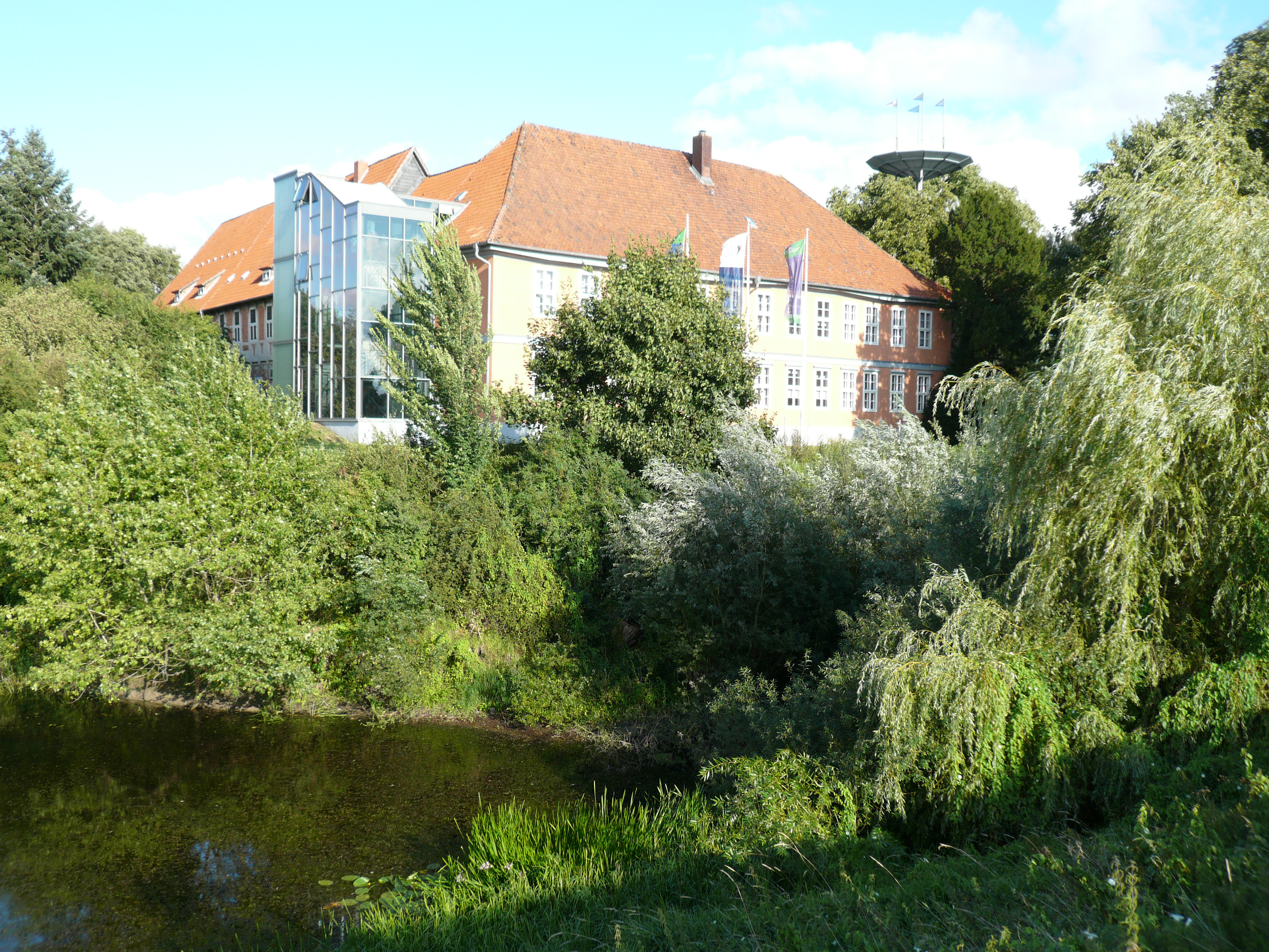 Elbschloss Bleckede mit Graben.